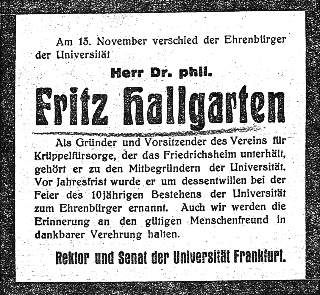 Todesanzeige der Frankfurter Universität für Fritz (Friedrich Siegmund) Hallgarten (10.07. 1865 - 13.11.1925), Mitbegründer und Ehrenbürger der Universität Frankfurt in den 'Frankfurter Nachrichten' vom Sonntag 15. November 1925